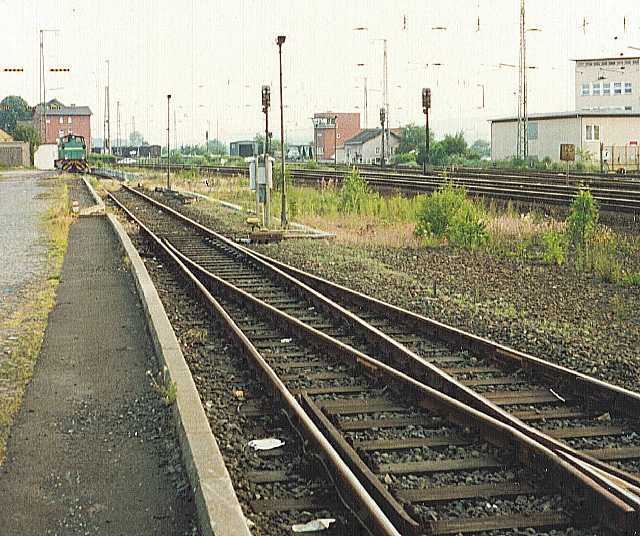 In südwestlicher Blickrichtung: links im Hintergrund das vermutlich 1878 errichtete Empfangsgebäude, unmittelbar davor in Gleis 57 war im Juni 1992 die Buderus-Werkslok abgestellt. Hinten weiter rechts dann der ehemalige Kleinlokschuppen, rechts daneben das Propangaslager, ein eingeschossiges weiß verputzes Sozialgebäude, dann das 1967 in Betrieb genommene Stellwerk, anschließend ein Lager und Werkstattgebäude der Nachrichtenmeisterei. Am rechten Bildrand folgen verschiedene Gebäude des Eisenwerks, wobei äußerst rechts das gelb lackierte Einfahrtstor aus Gleis 13 erkennbar ist. Der Güterschuppen (Gleis 7) befindet sich "im Rücken des Fotografen". Gleis 7 mündet hier noch in Gleis 57. Die ehemaligen Gleise 4 und 3 (Lumdatalbahn) sind im Bild nur noch als Schotterwüste vor den Main-Weser-Bahn-Gleisen erkennbar. Gegen Ende der 1980er Jahre wurden diese Gleise in dem Bereich schon zurückgebaut, als die Überführung der Bahnhofstrasse neu gebaut wurde.